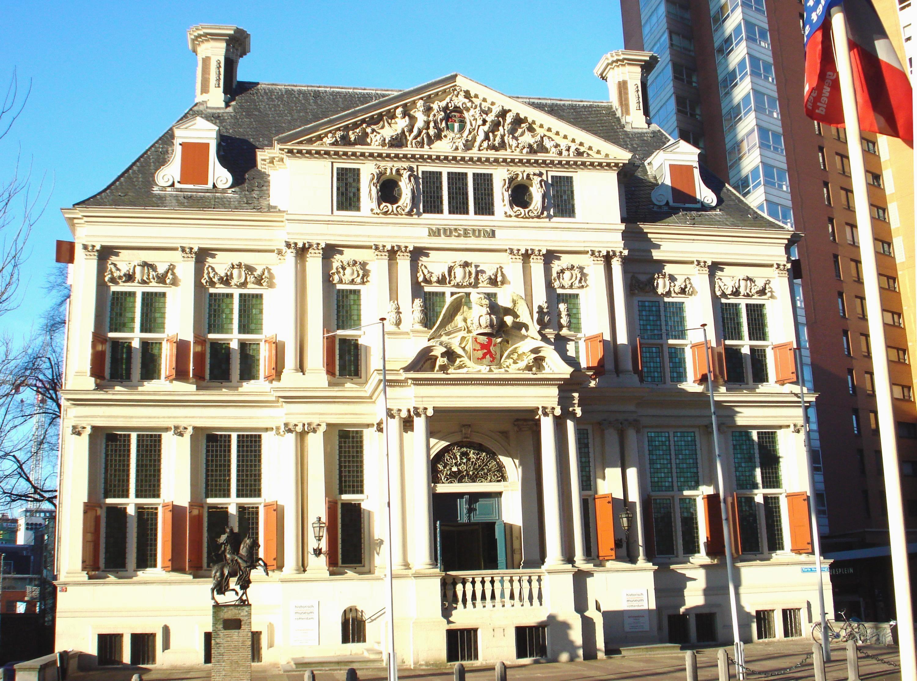 Rotterdam historisch: Schielandshuis. Museum. Rijksmonument.